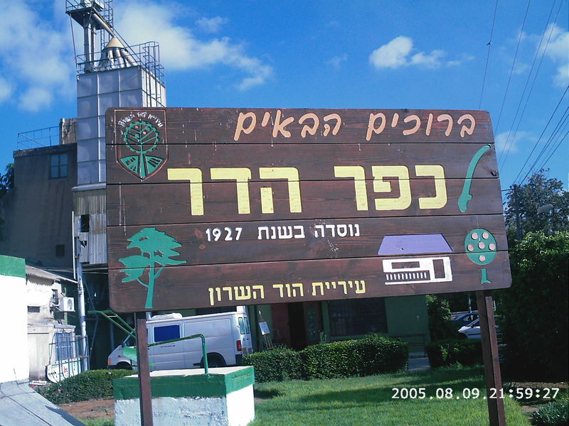 Kefar Hadar, Hod HaSharon, ISRAEL